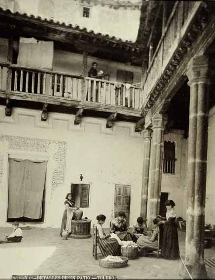 Detalles de un patio. Toledo.